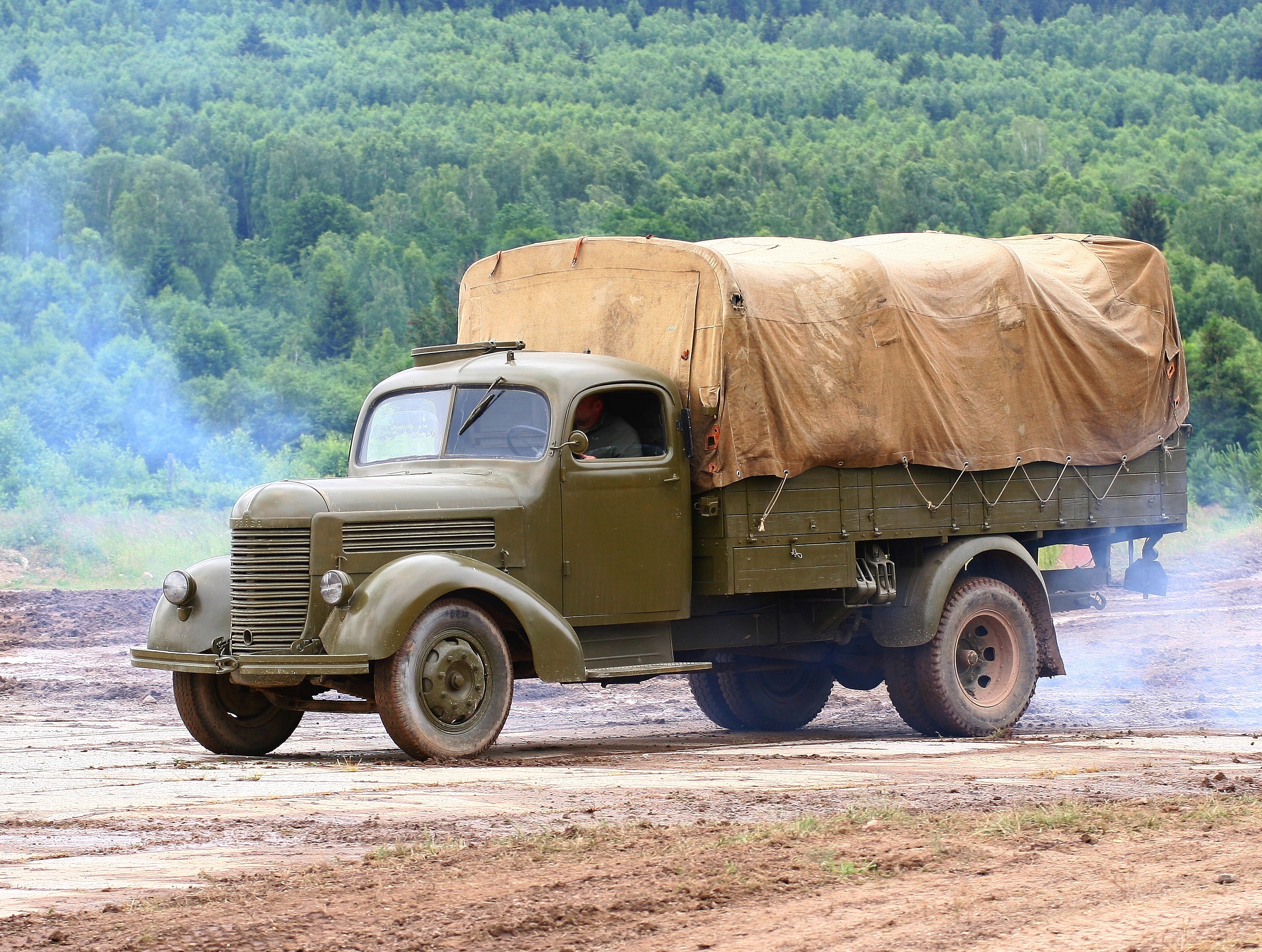 Vojenská technika zaznamenaná při dynamických ukázkách na Dni pozemního vojska BAHNA 2018, který pořádá Velitel společných sil a Nadace pozemního vojska AČR.